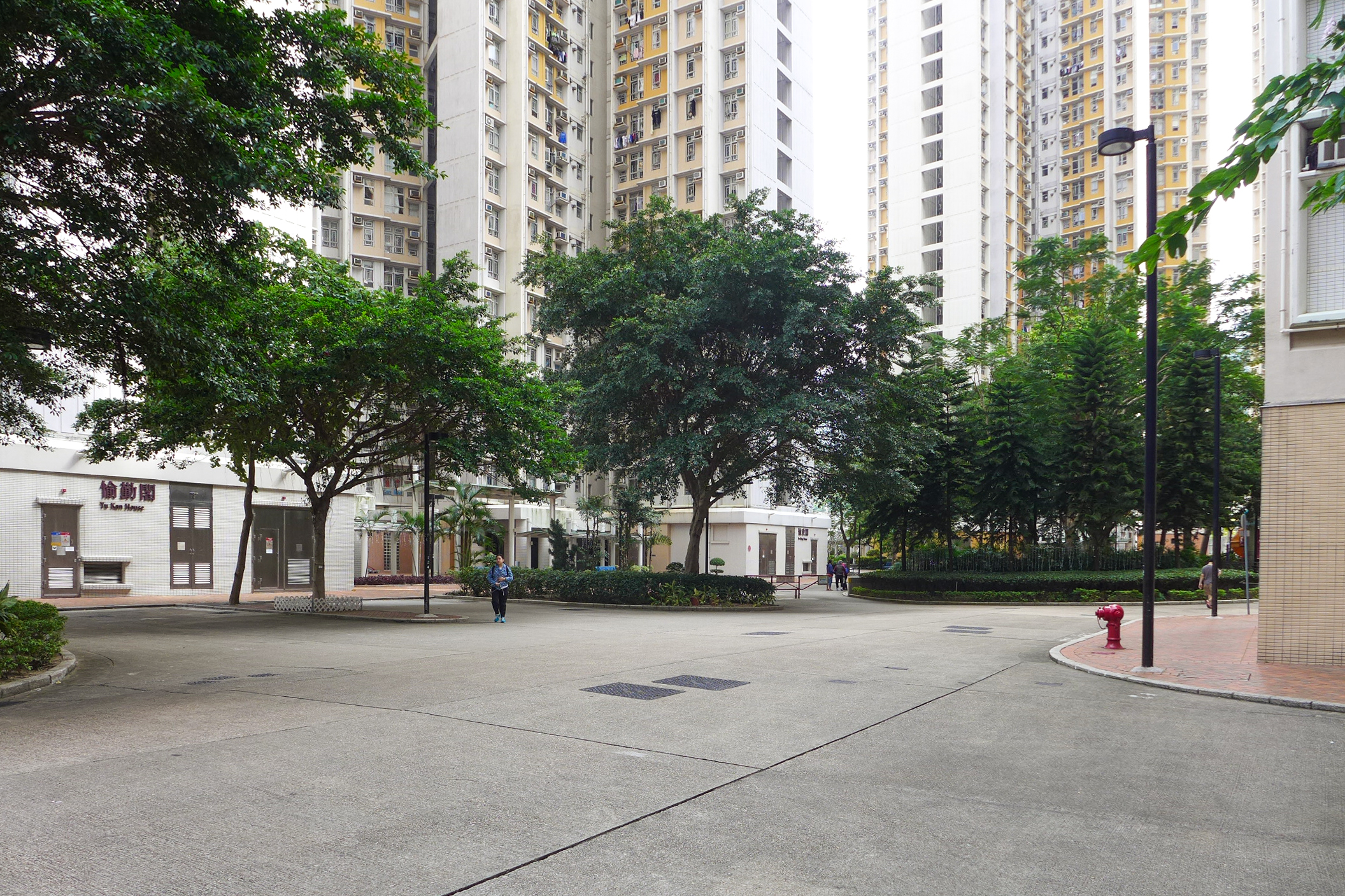 Yu Chui Court EVA